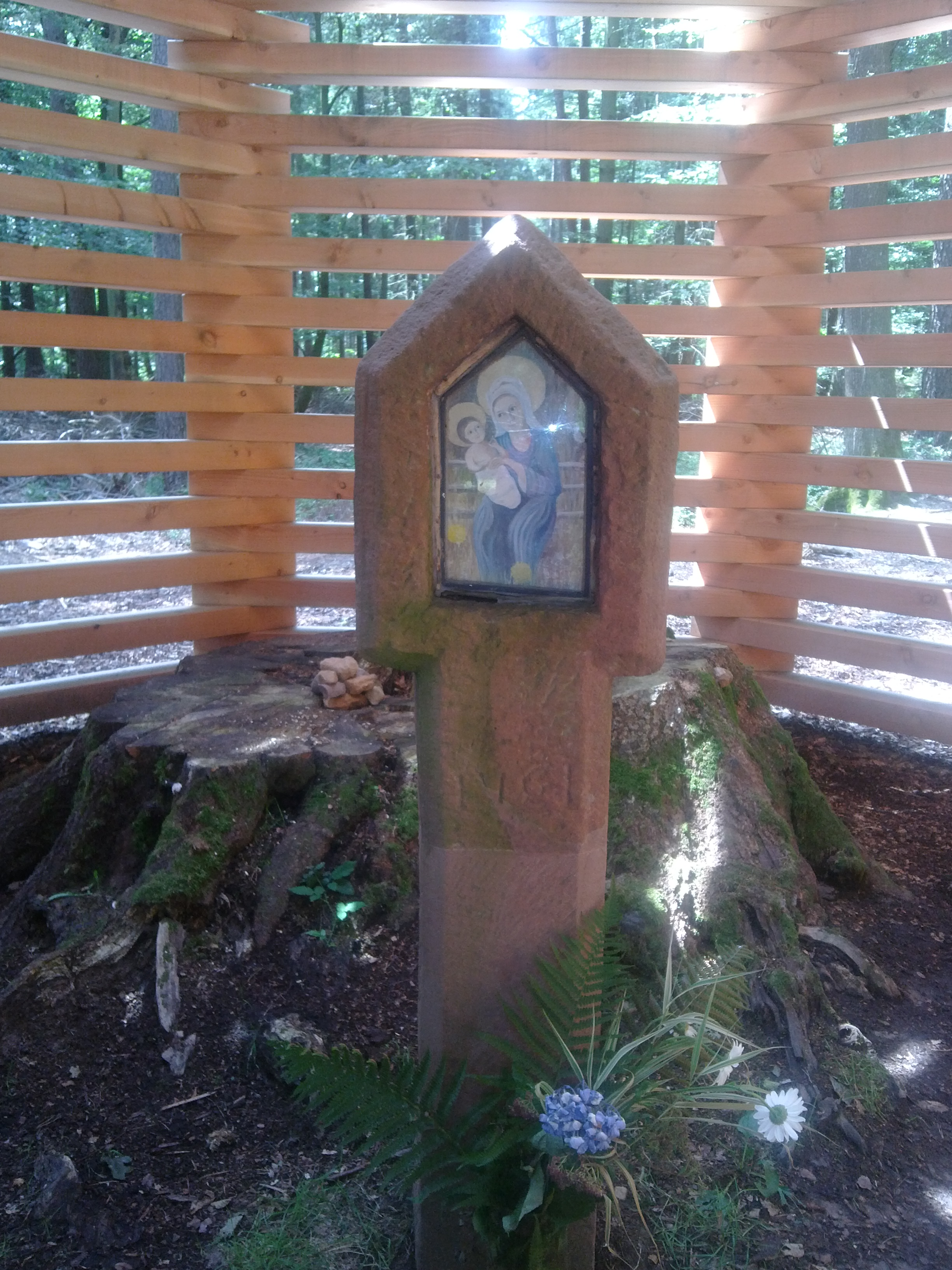 Bildstock neu 1